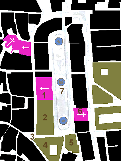 Pianta della Piazza Navona, Roma